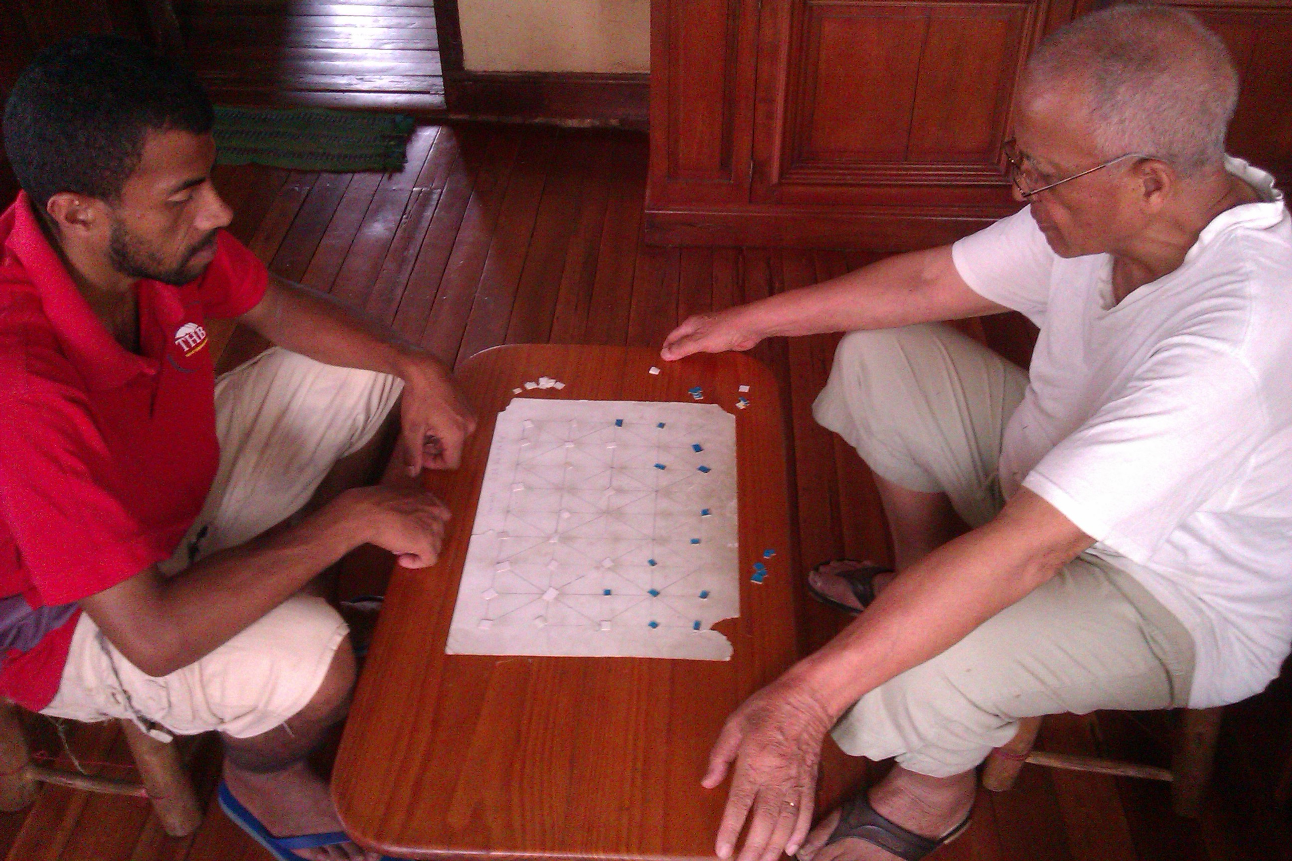 Le Fanorona est un jeu que les générations se transmettent. Le but de ce jeu est de capturer les pierres de la partie adverse. Ici, un simple papier cartonné et des pions en papier ont été utilisés comme supports. This is an image with the theme "Play" from: Madagascar